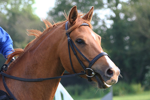 Arabian portrait